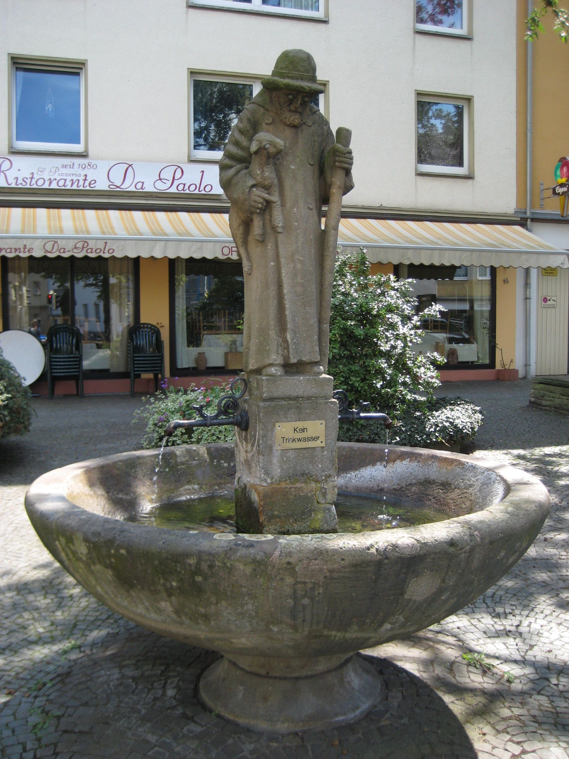 So genannter Schäferbrunnen in Osnabrück, Skulptur von Georg Hörnschemeyer, die eine im WW II zerstörte ersetzte